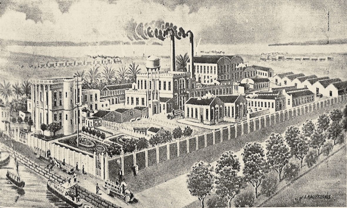 Χρωμολιθογραφείο και χαρτοποιεία Κ. Ι. Λαγουδάκη και Σια στην Αλεξάνδρεια